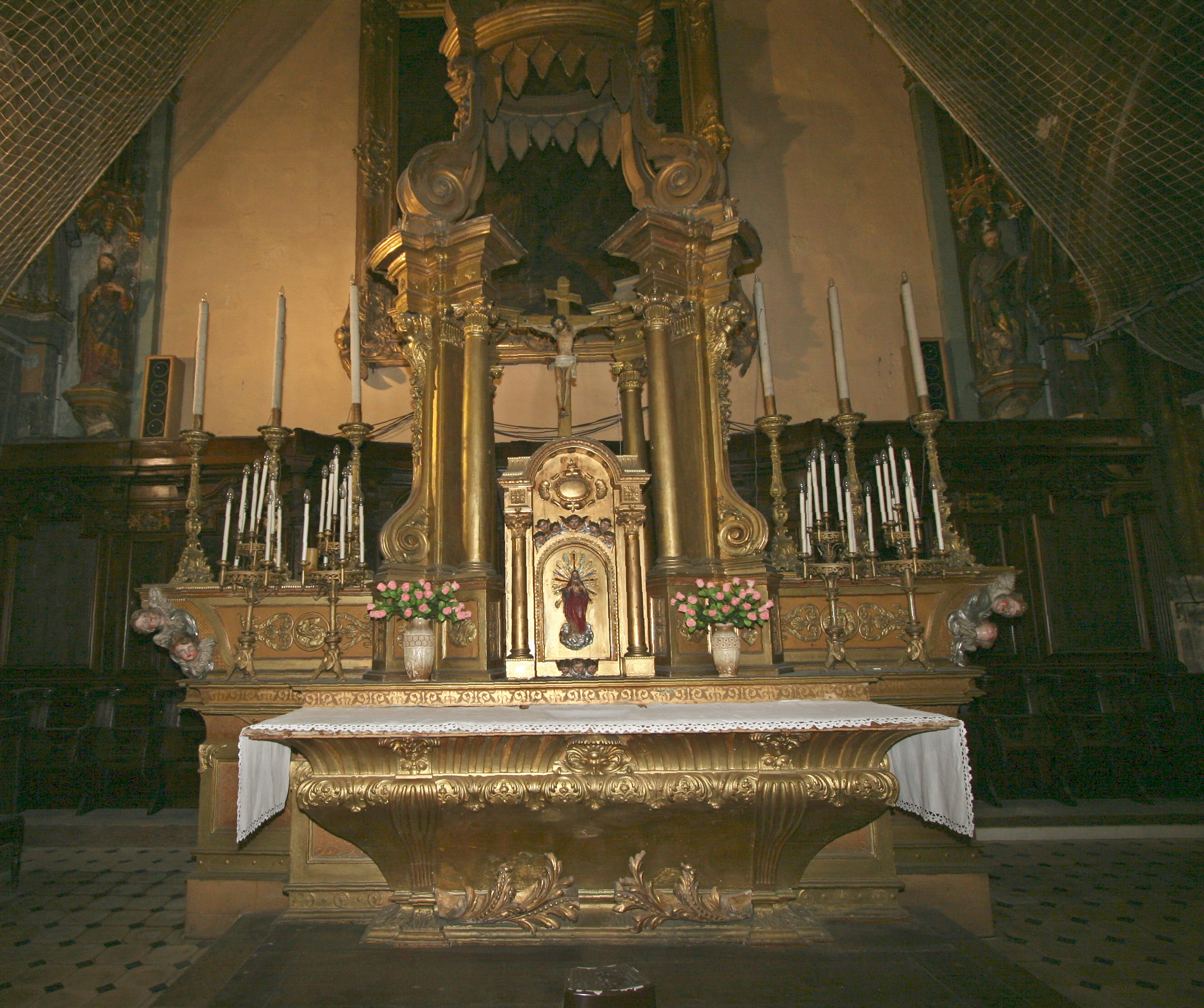 Autel de l'église des Grands Carmes à Marseille.